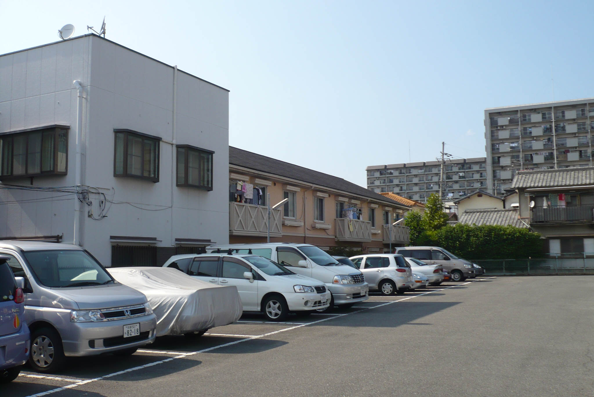 山科本願寺の御影堂推定地跡